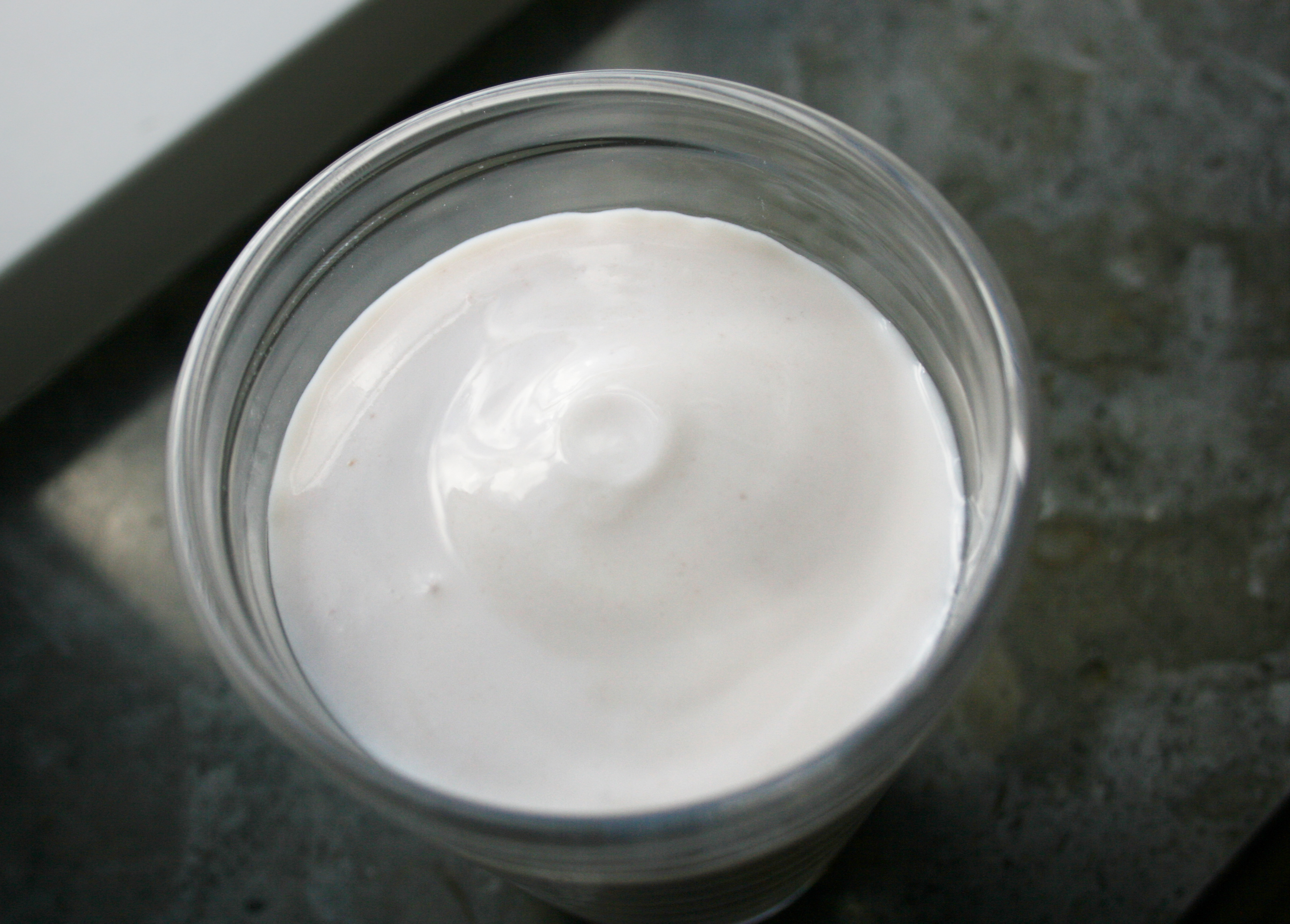 Filmjölk